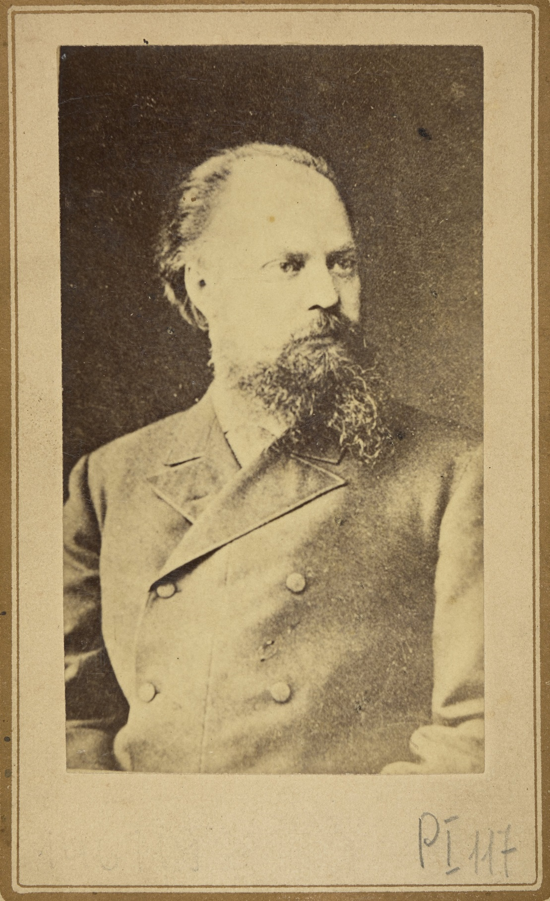 Portret Konstantina Makowskiego